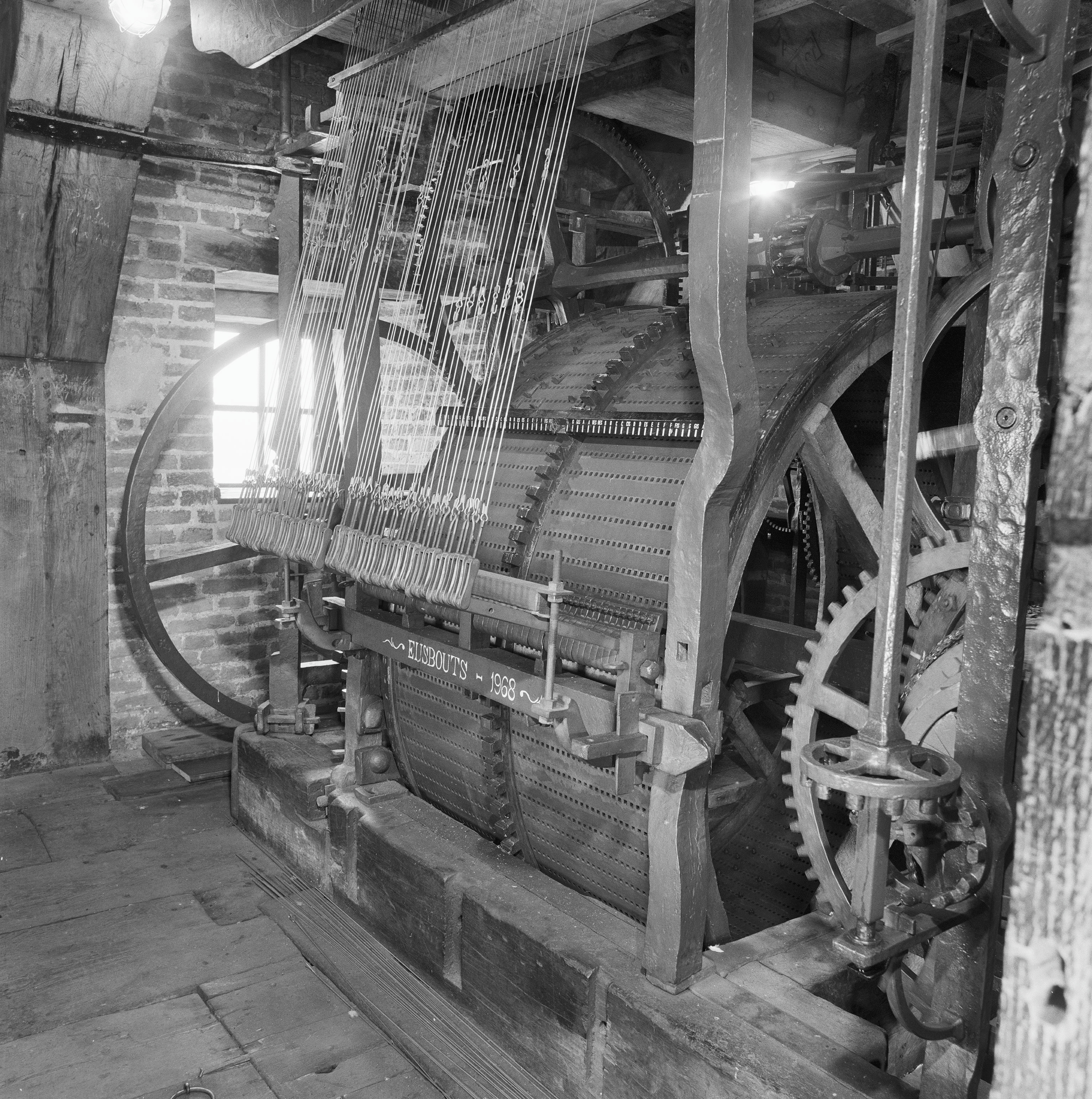 WAAG: INTERIEUR, TOREN, KLOKKENSPEL, SPEELTROMMEL